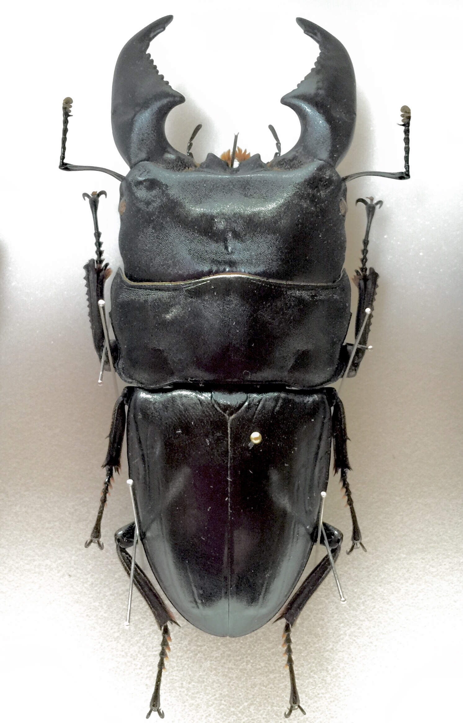 ヒラタクワガタ スマトラ島産100㎜ 頭幅36.5 胸幅39.5㎜